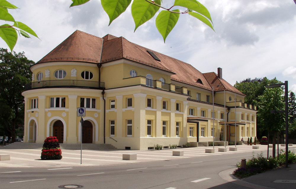 Konzerthaus in Heideneim